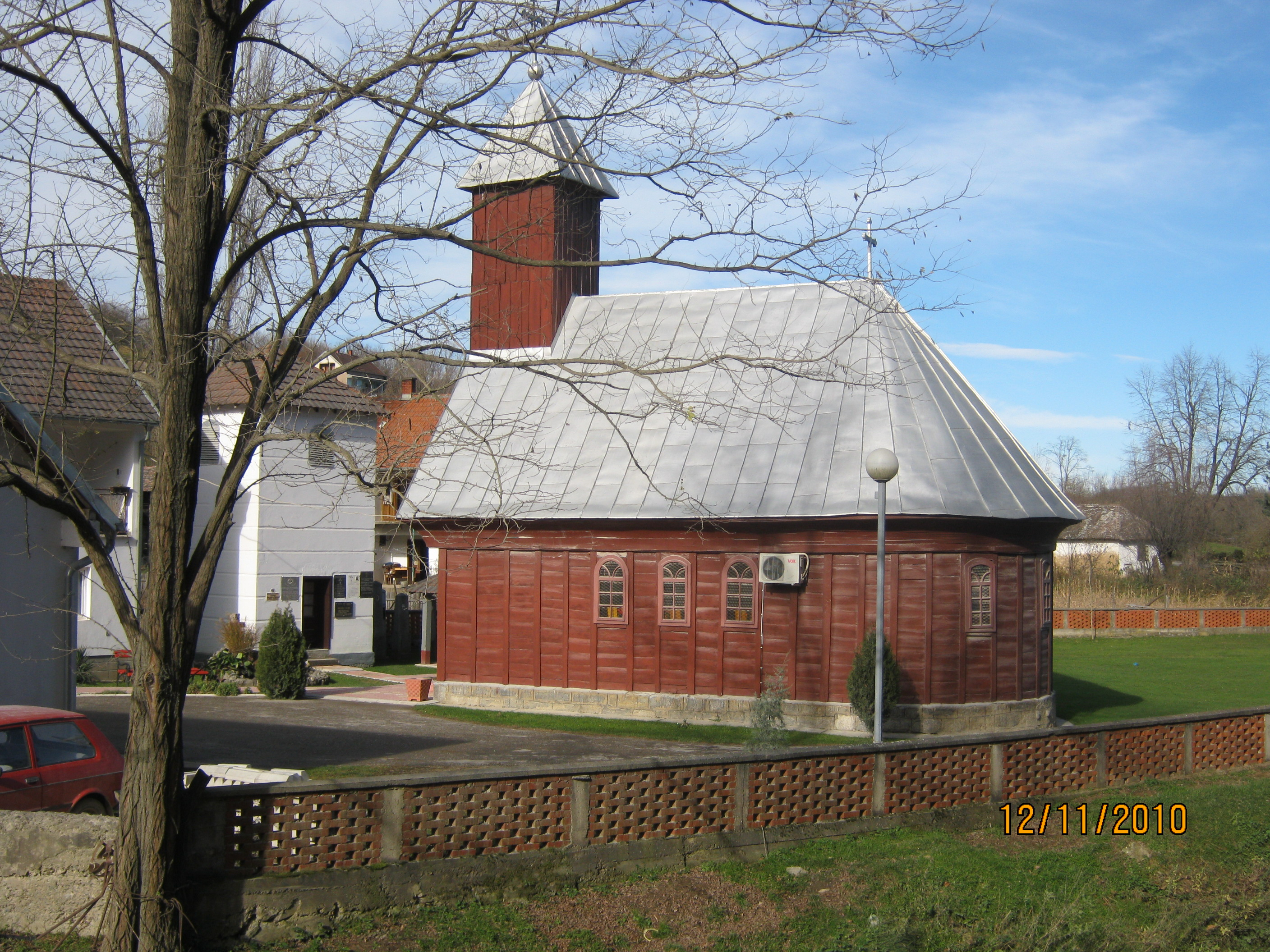 Crkva pripada Eparhiji šabačkoj. Podignuta 1944. godine.